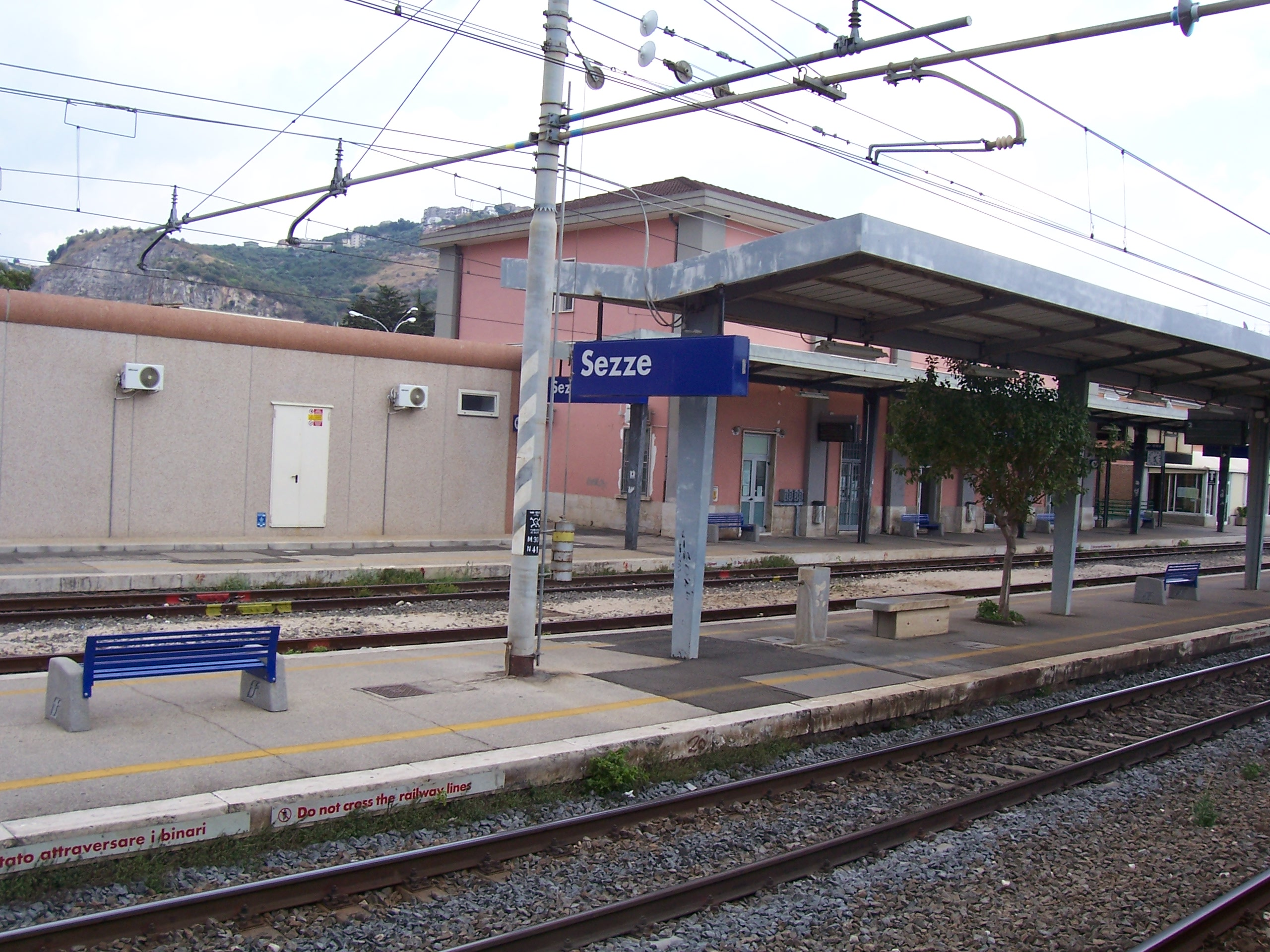 Sezze (LT, Italy) train station - Stazione di Sezze (LT)